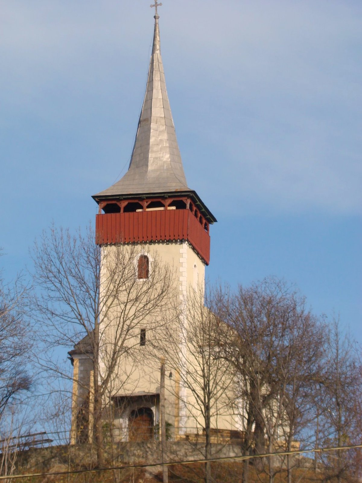 Biserica Naşterea Maicii Domnului din Geoagiu de Sus, judeţul Alba